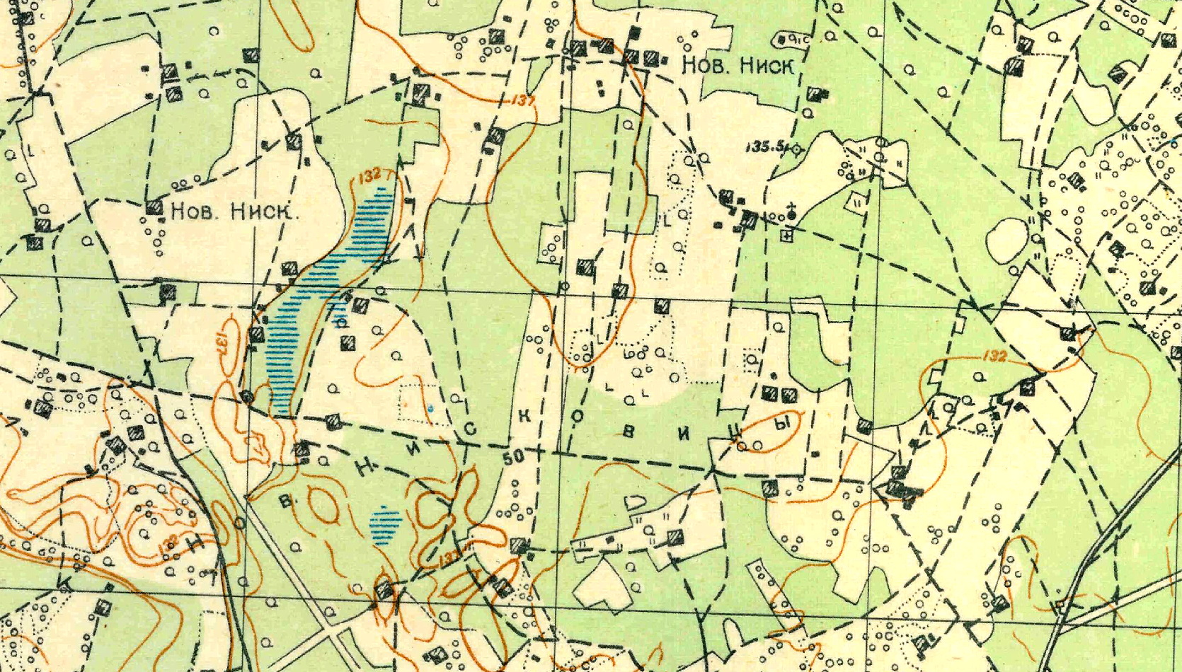 Топографическая карта Ленинградской области, квадрат О-35-24-А-б (Витино), деревня Новые Низковицы